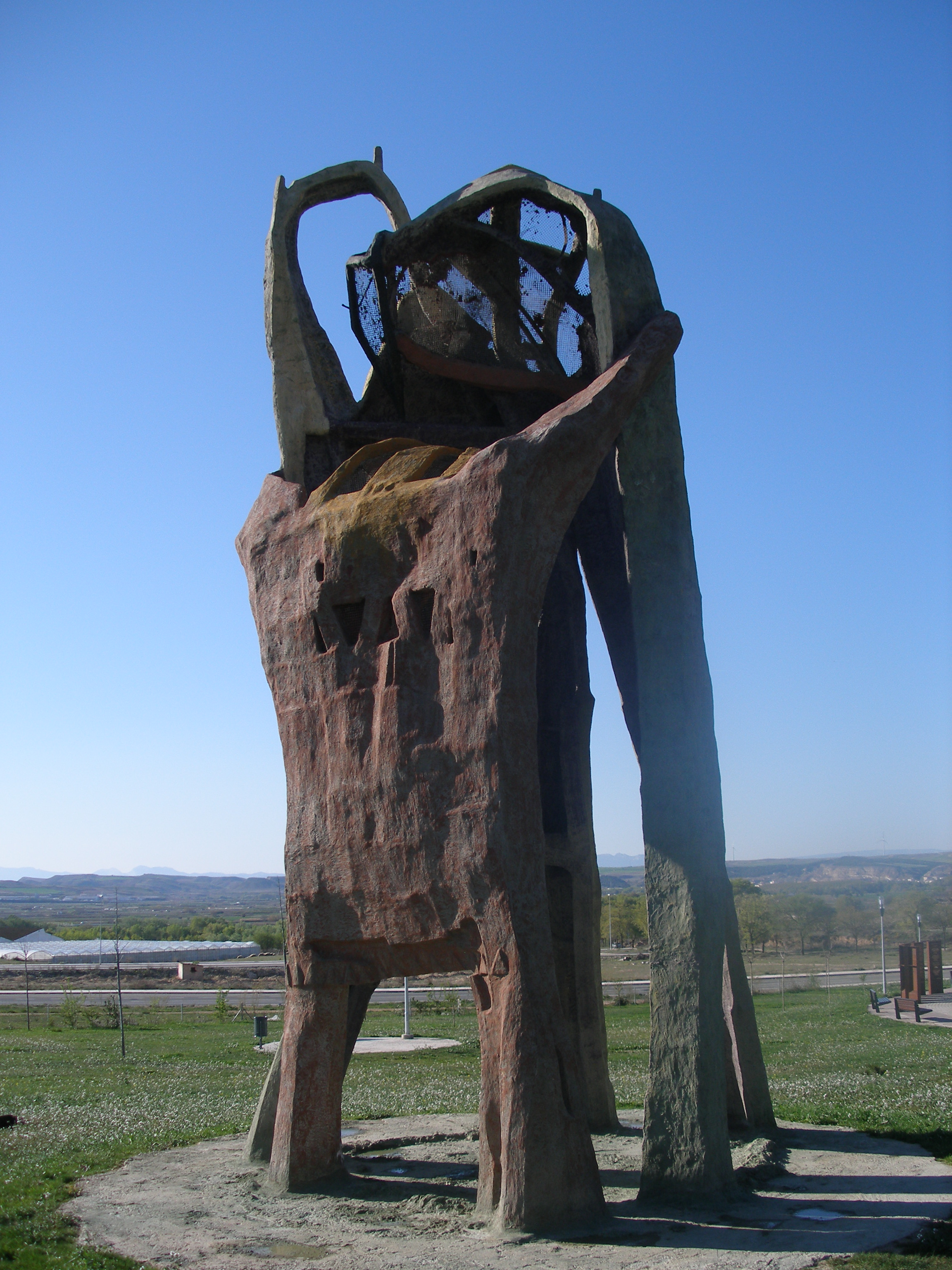 Obra escultorica del parque de la memoria de SartagudaEuskara: Sartagudako memoriaren parkeko eskultura lana